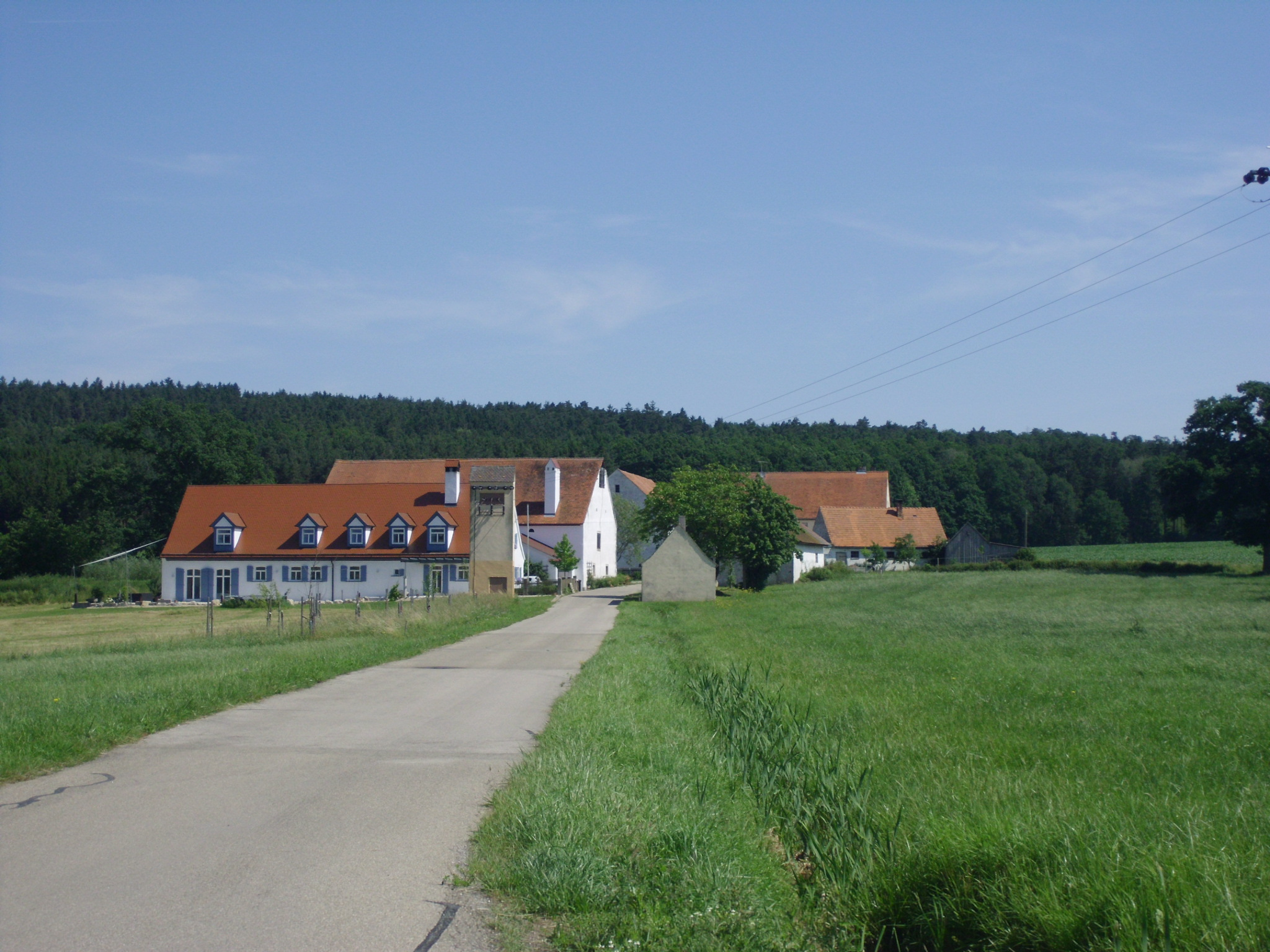 Schertnershof, Ortsteil von Treuchtlingen im Landkreis Weißenburg-Gunzenhausen